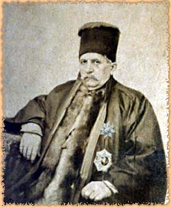 Dimitrios Voulgaris Portrait